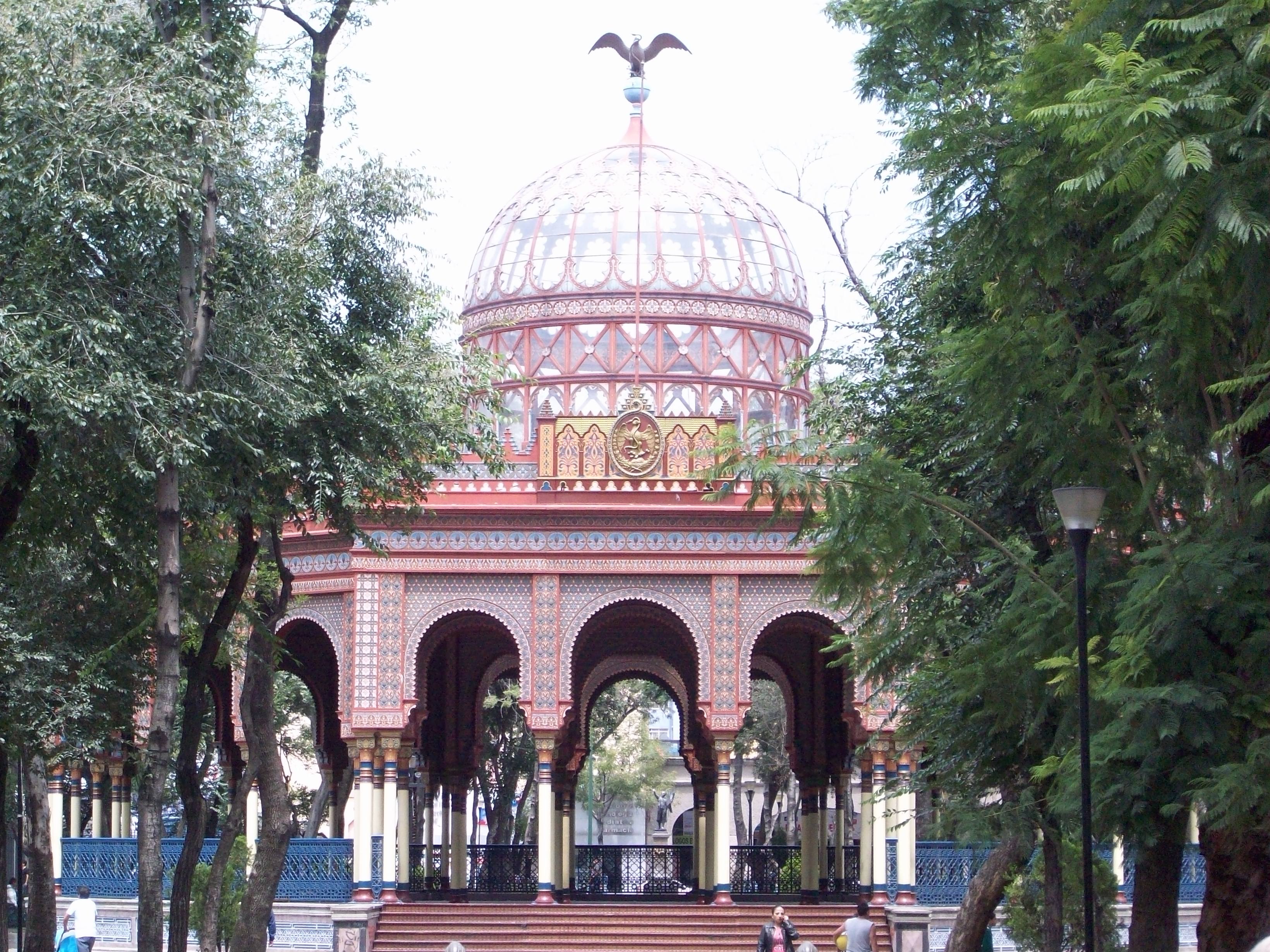 Kiosco Morisco